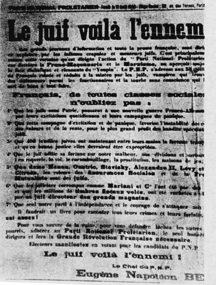 Photographie d'une affiche antisémite du Parti national prolétarien (PNP) d'Eugène-Napoléon Bey pour les élections municipales de 1935.